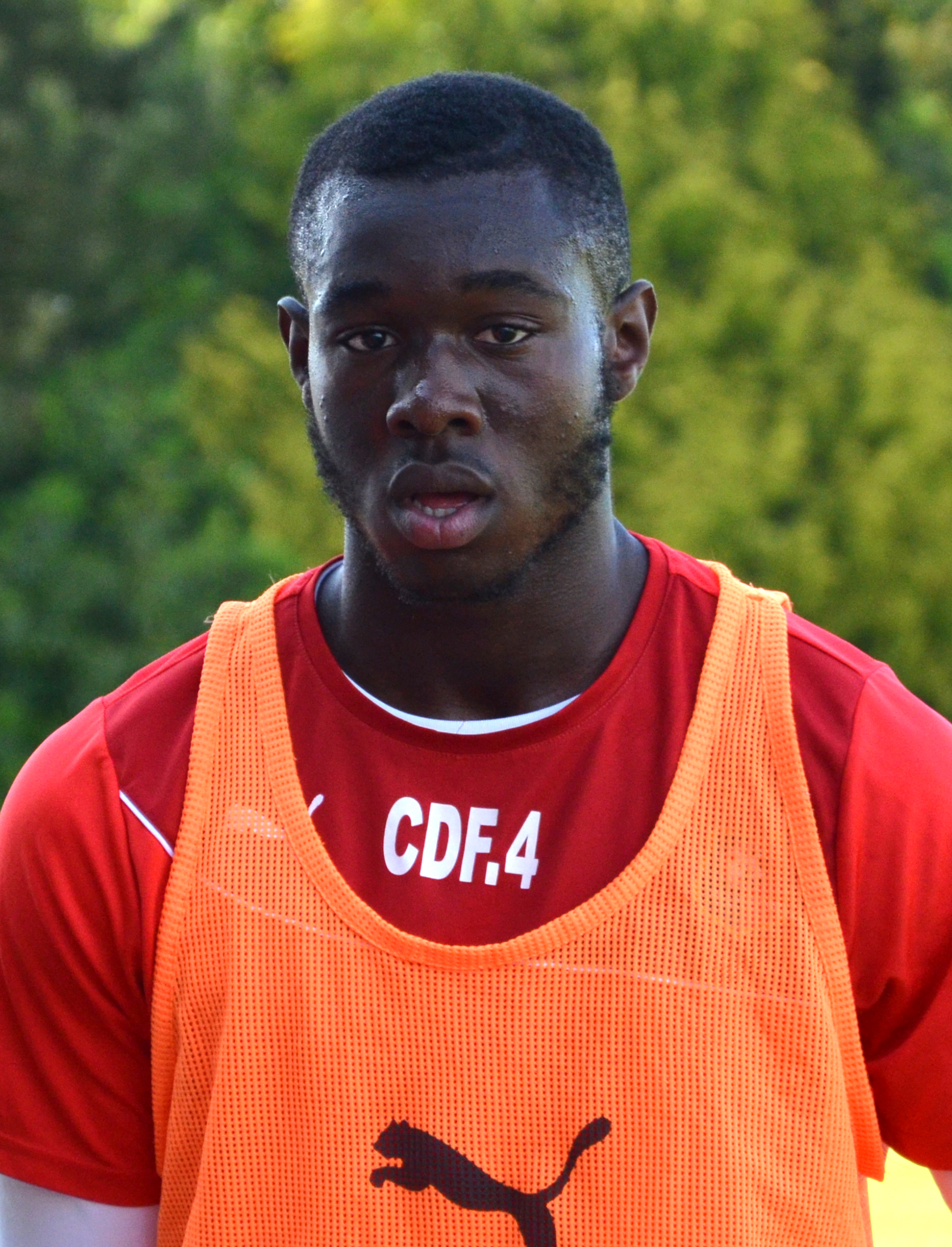 Photographie de Joris Gnagnon lors d'un match de CFA2 opposant le FC Saint-Lô au Stade rennais le 23 mai 2015.